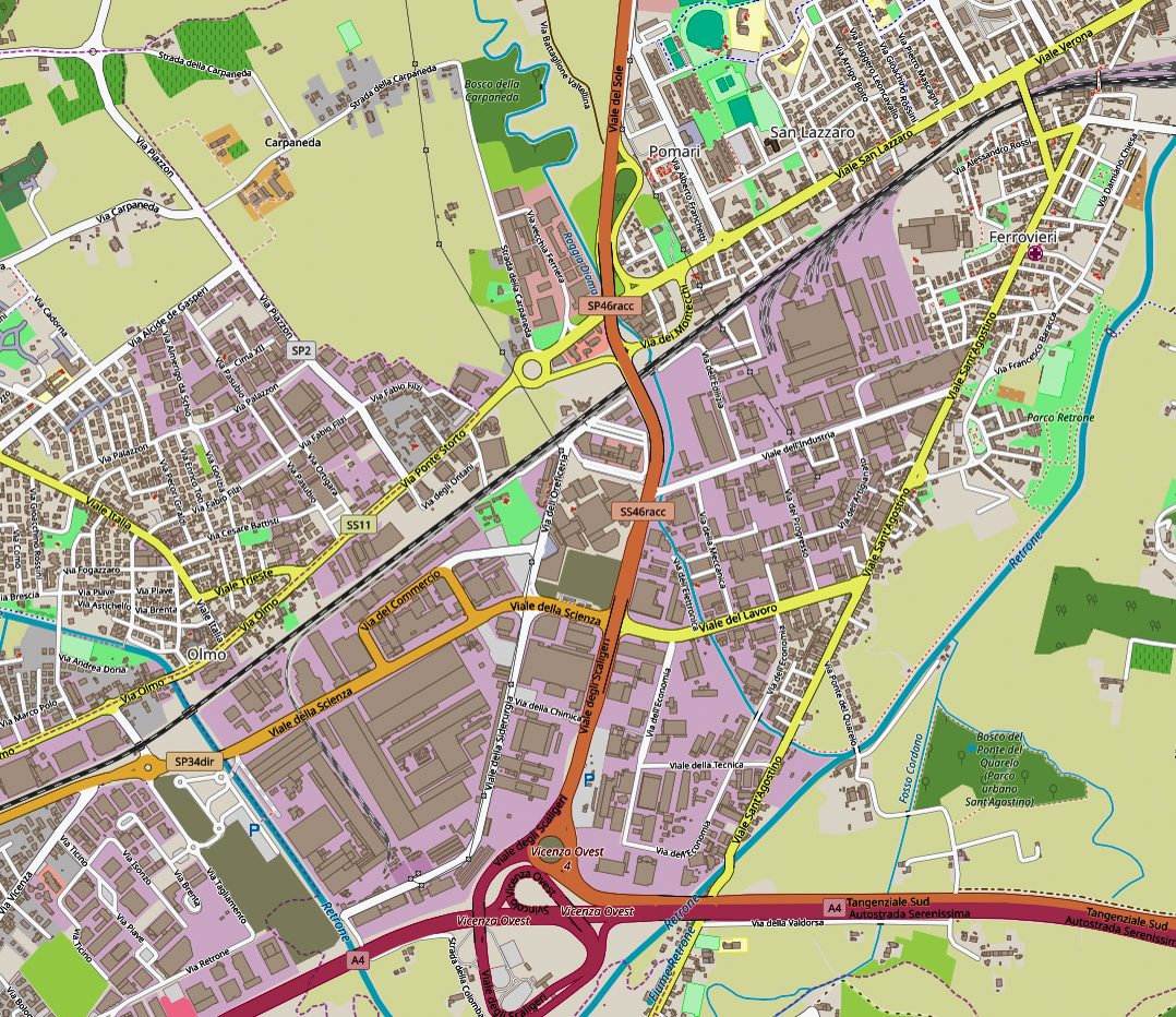 Mappa della Zona Industriale Ovest